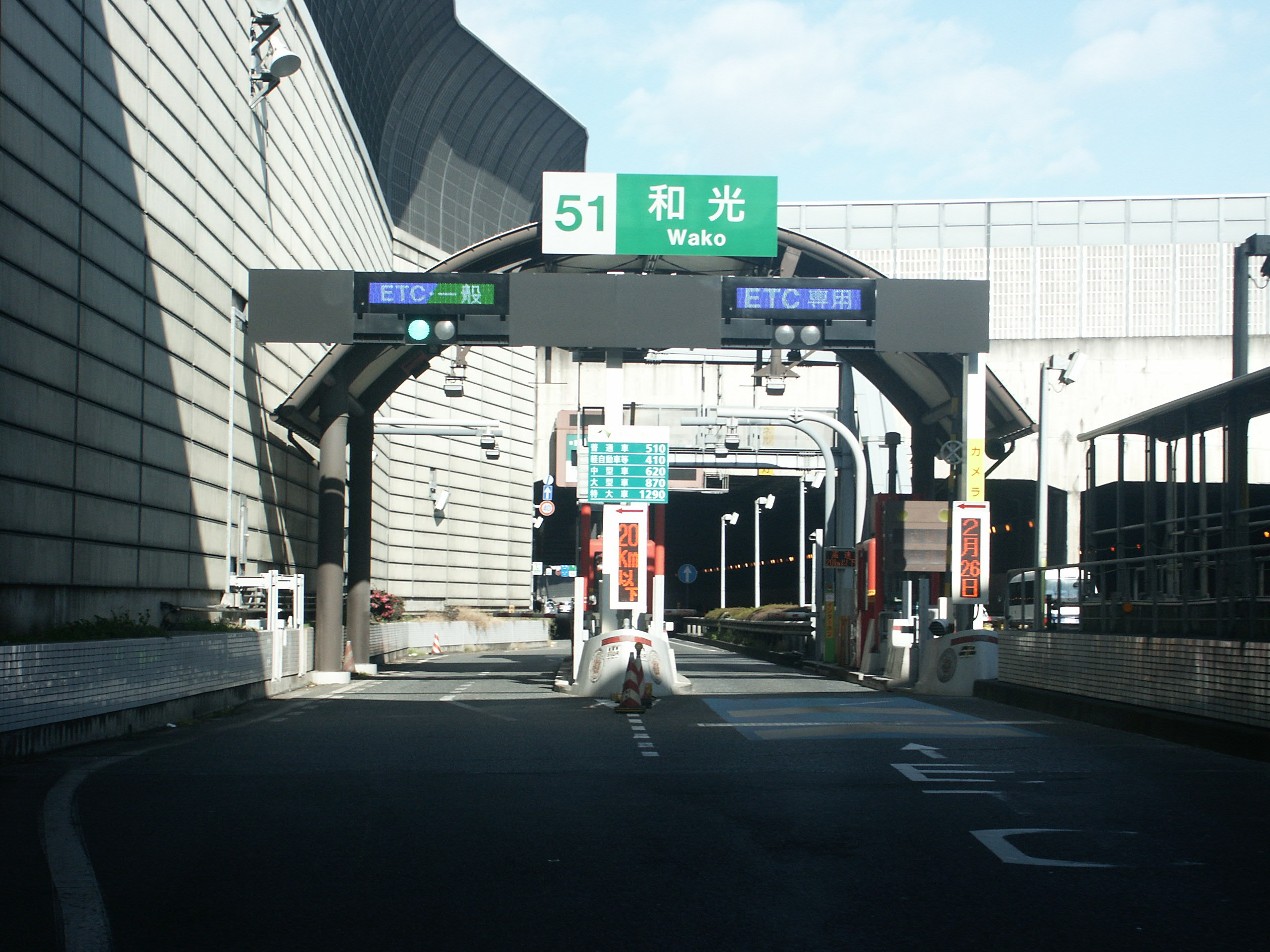 東京外環自動車道和光インターチェンジ料金所（美女木JCT方面側）